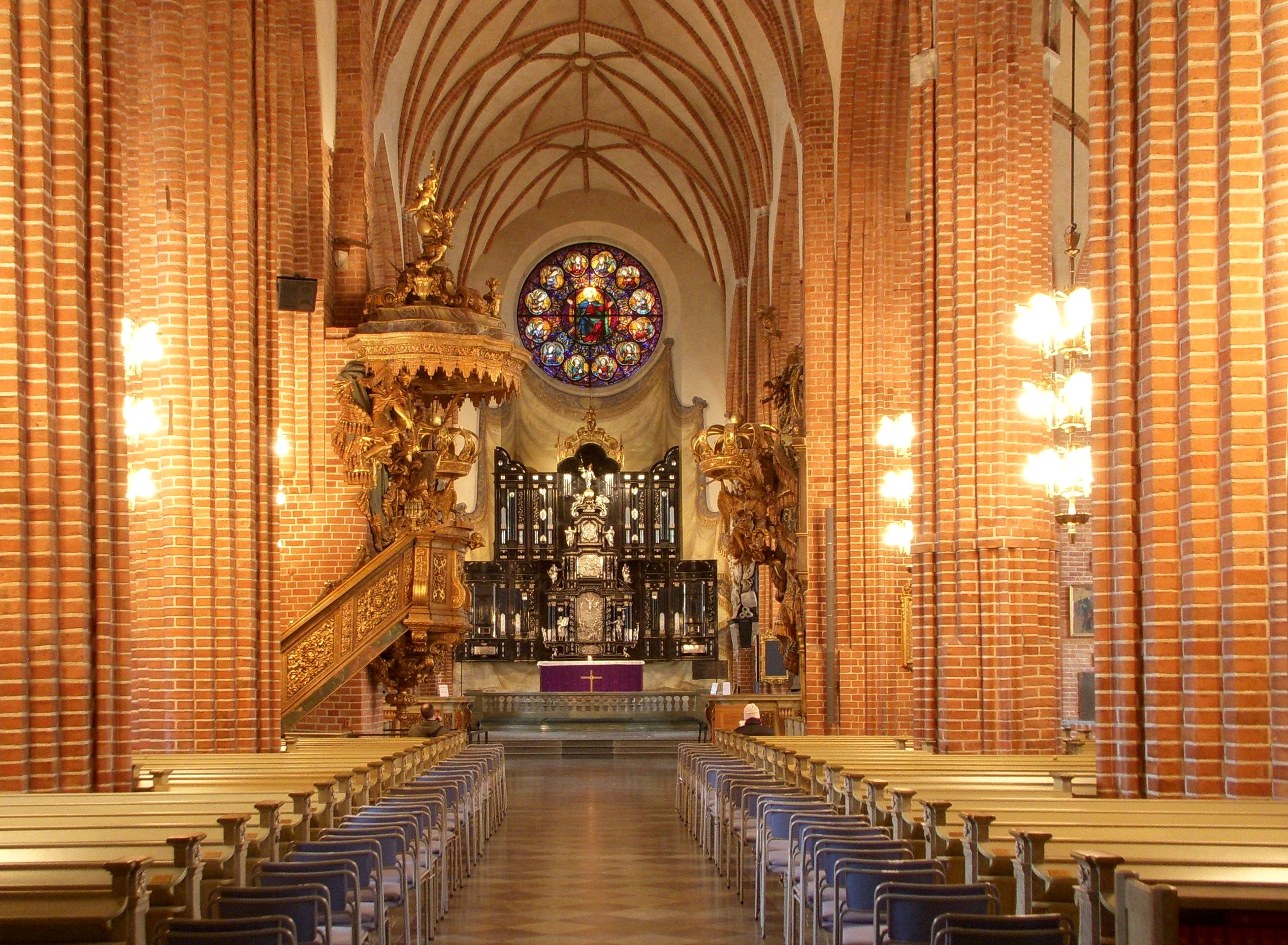 Storkyrkan i Stockholm, efter renoveringen 2010, altargången